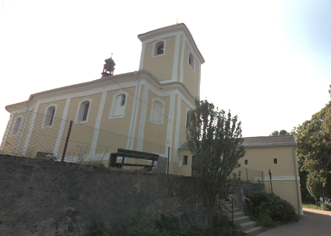 kostel Horní Hynčina